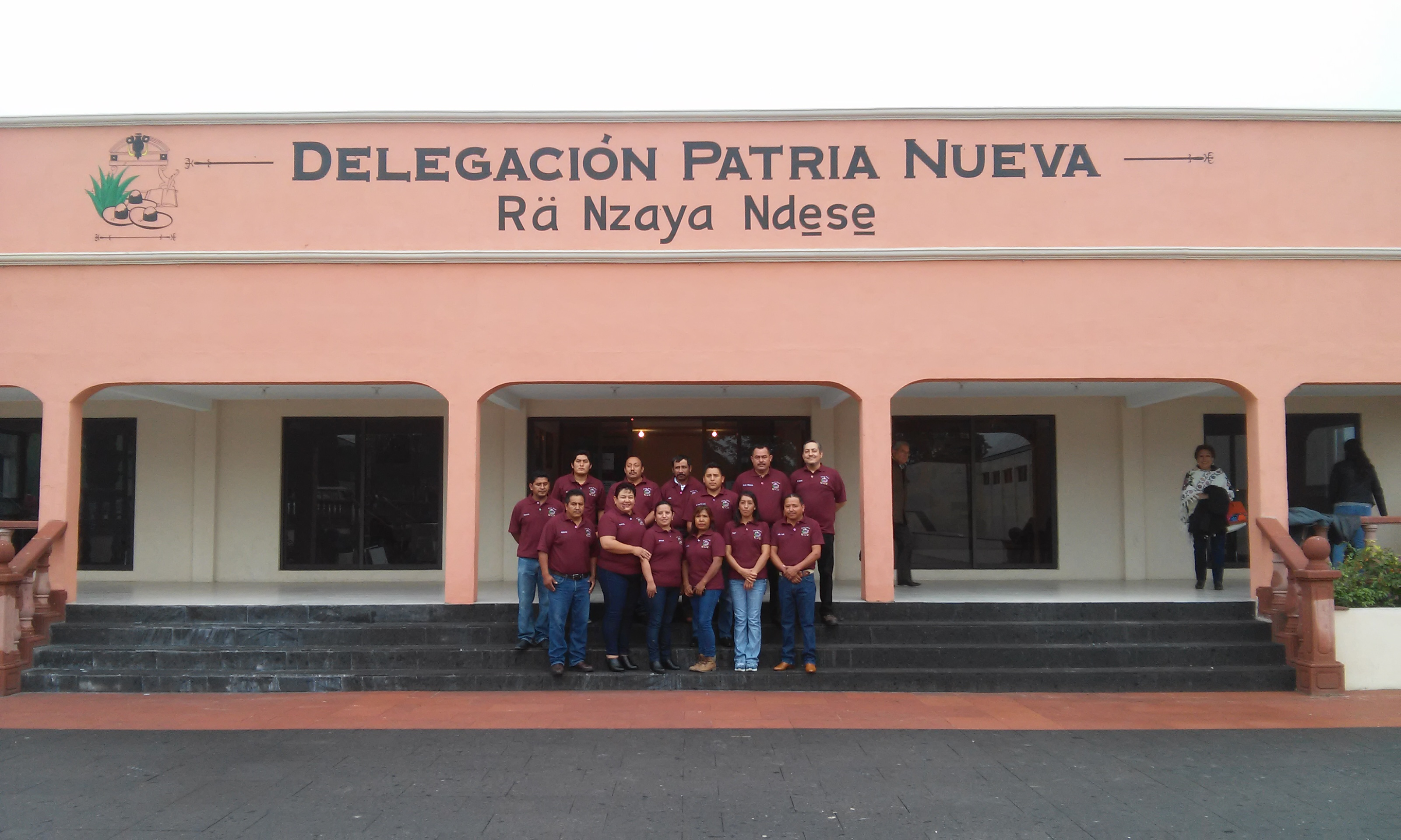 Fachada de las Oficinas de la Delegación.